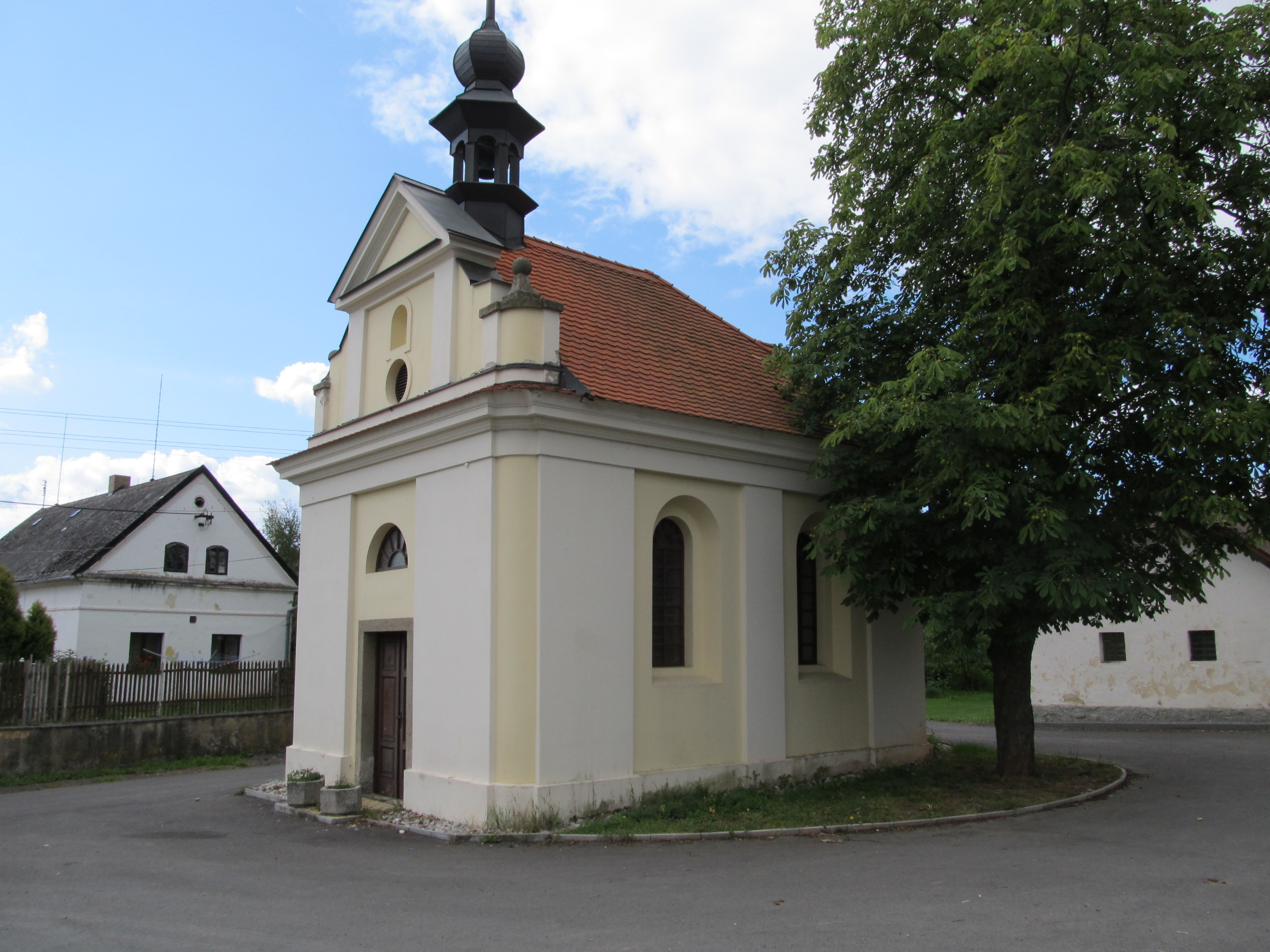 Hůrky - kaplička